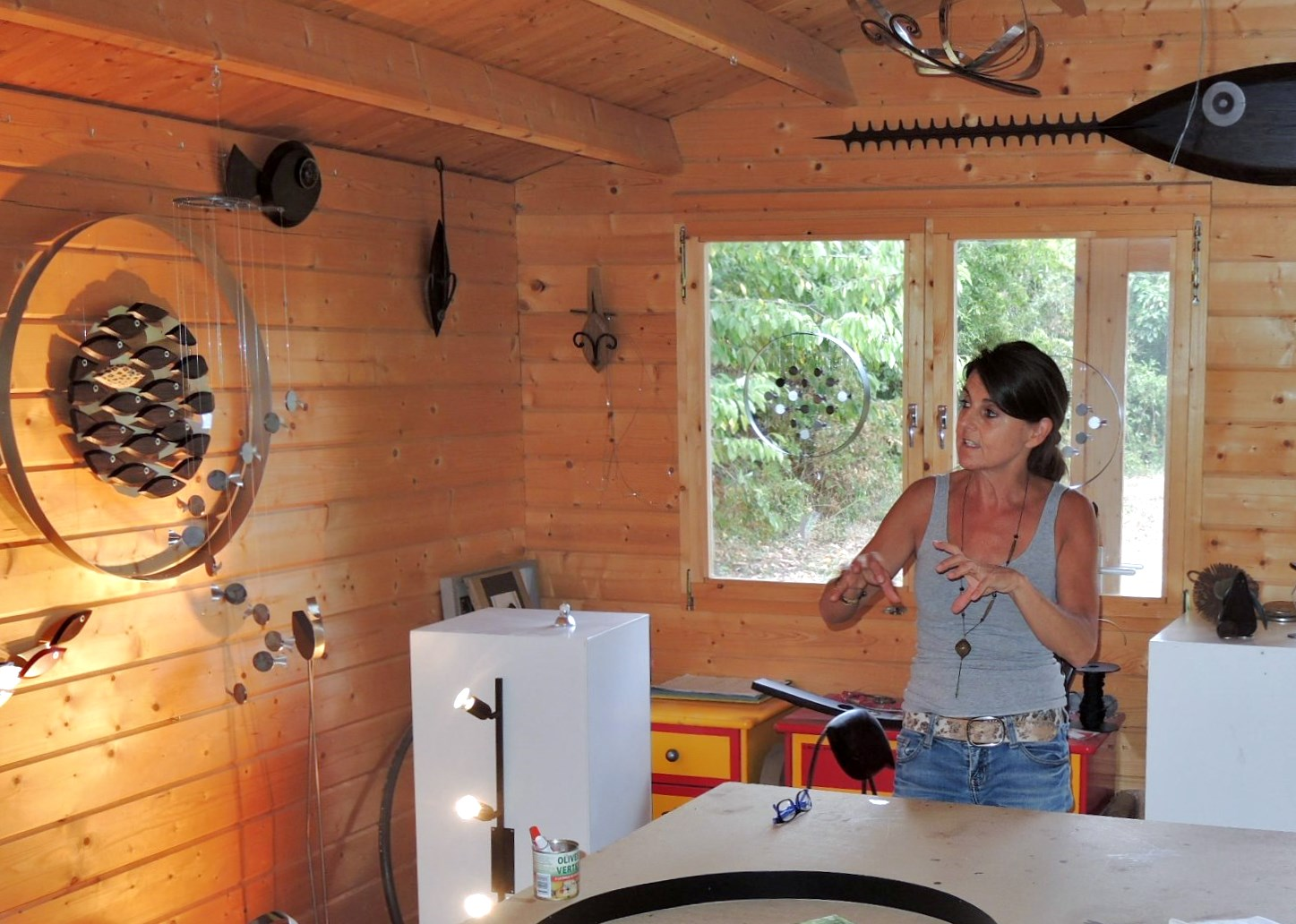 Bogy détail